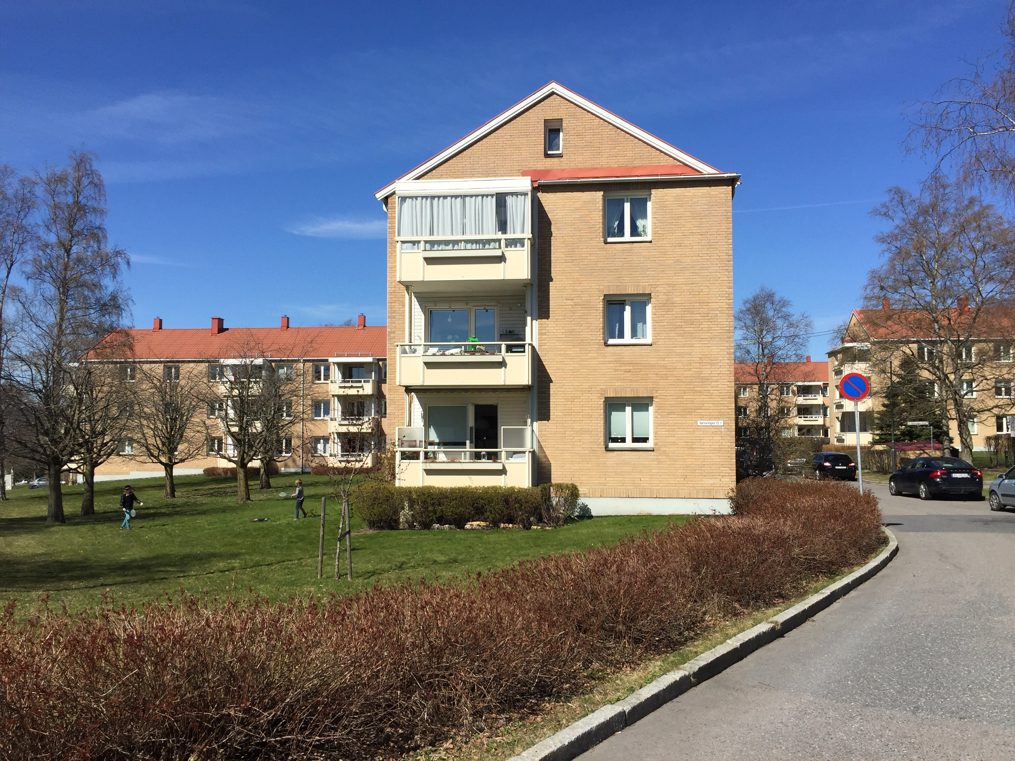 Vårsvingen i Oslo.